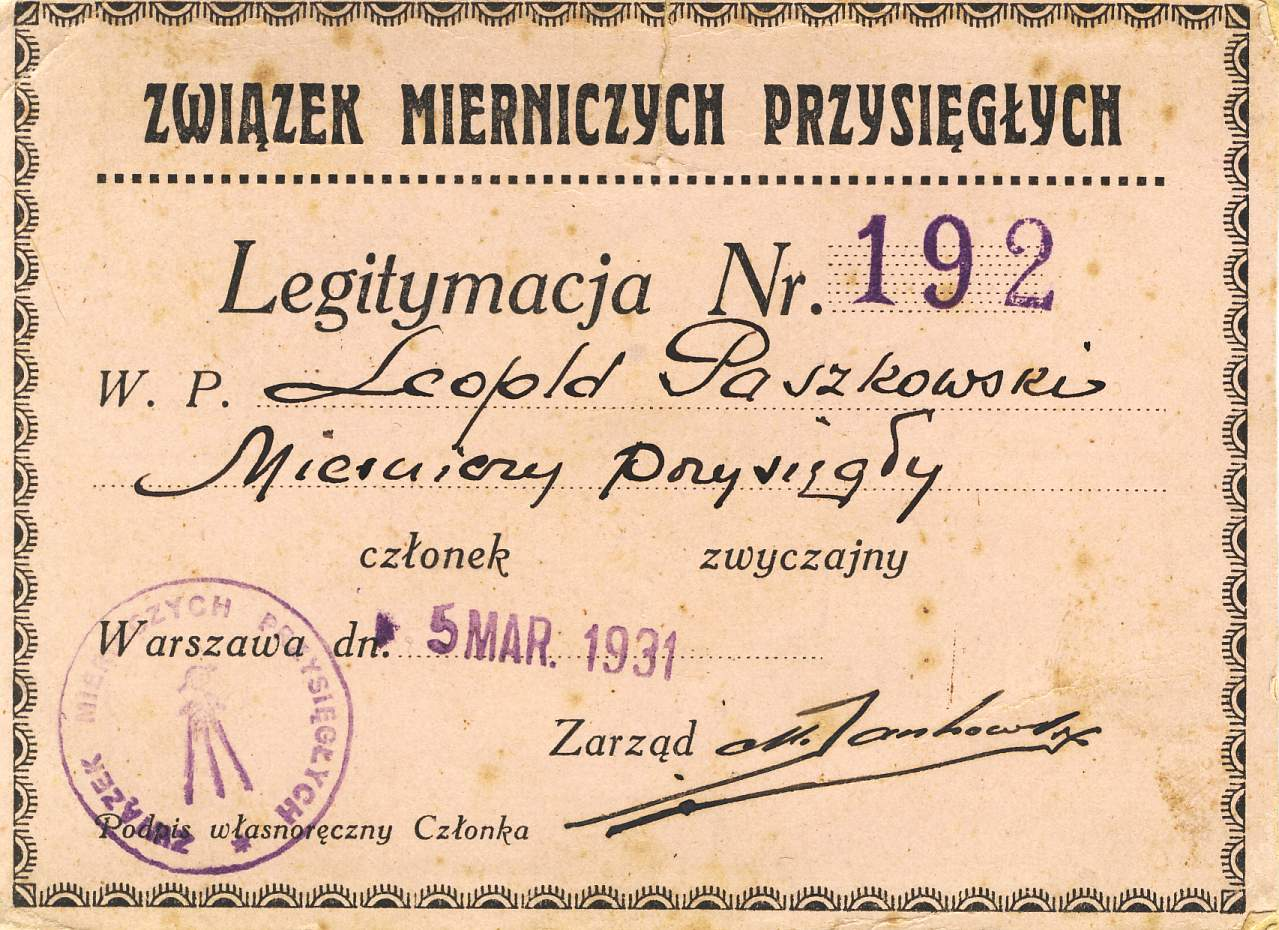 Legitymacja członkowska Związku Mierniczych Przysięgłych Zenon Paszkowski, Polacy z Kresów Wschodnich na Warmii i Mazurach - Leopold Kleofas Paszkowski